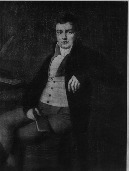 Heinrich Kamp, Ölgemälde von Heinrich Christoph Kolbe